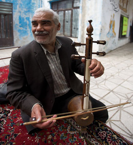 Kamancheh Player, Kermanshah